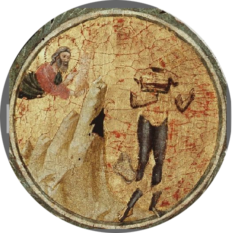 detail